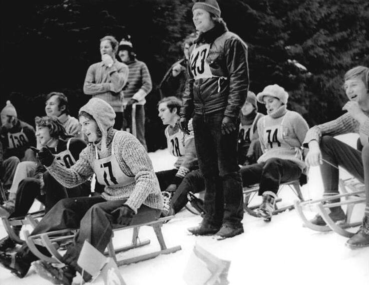 Masserberg, Wettrodeln der Landjugend ADN-ZB Ludwig-13.1.74 Bez. Suhl: Sterntreffen der Landjugend- Mehrere tausend Jügendliche aus der Land-, Forst- und Nahrungsgüterwirtschaft der DDR trafen sich am 12.1.84 in Masserberg bei einem Sterntreffen zu wintersportlichen Wettkämpfen. Die Jugendlichen, die sich im vergangenen Jahr durch hohe Wettbewerbsleistungen auszeichneten, verleben gegenwärtig erholsmae Urlaubstage im Thüringer Wald. - Besonders beliebt war das Rodeln; hier mit der Startnummer 77 Jugendfreundin Lorenz aus dem Bezirk Karl-Marx-Stadt.